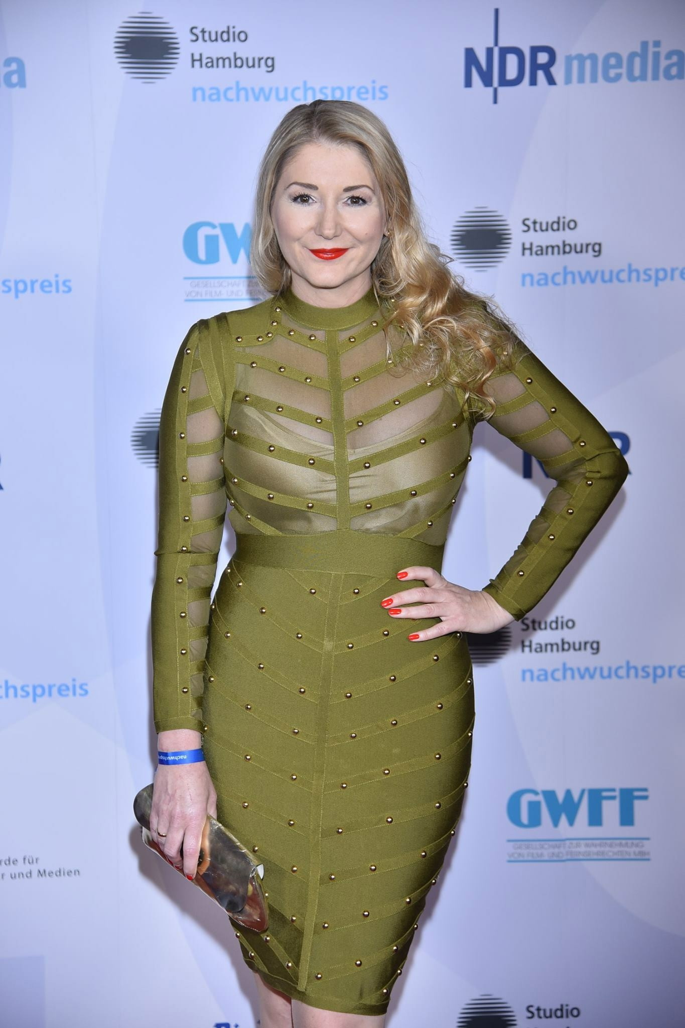 Schauspielerin Sandra Quadflieg auf dem Red Carpet beim 20. Studio Hamburg Nachwuchspreis 2017.